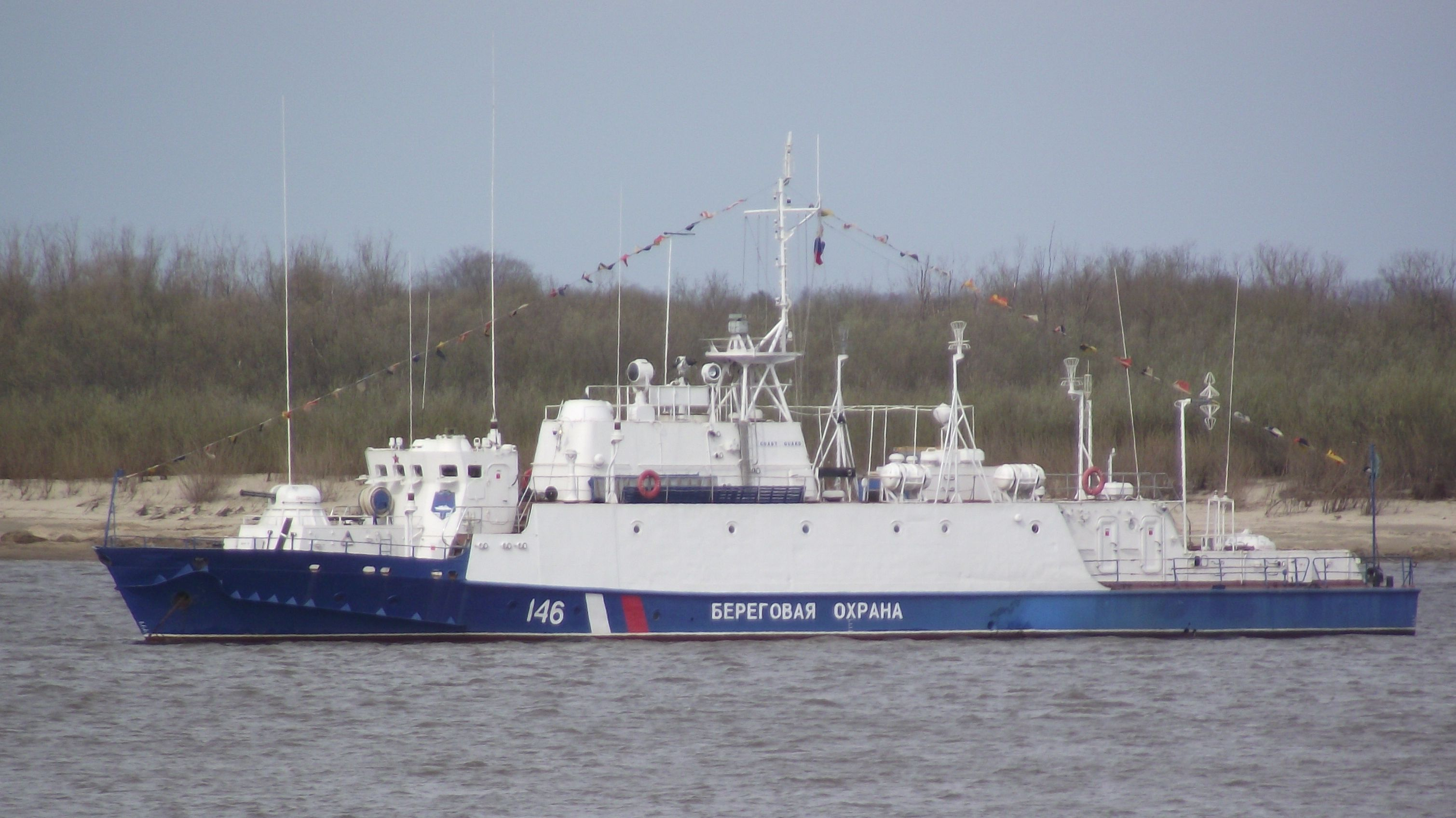 Корабль Амурской флотилии - ПСКР-54